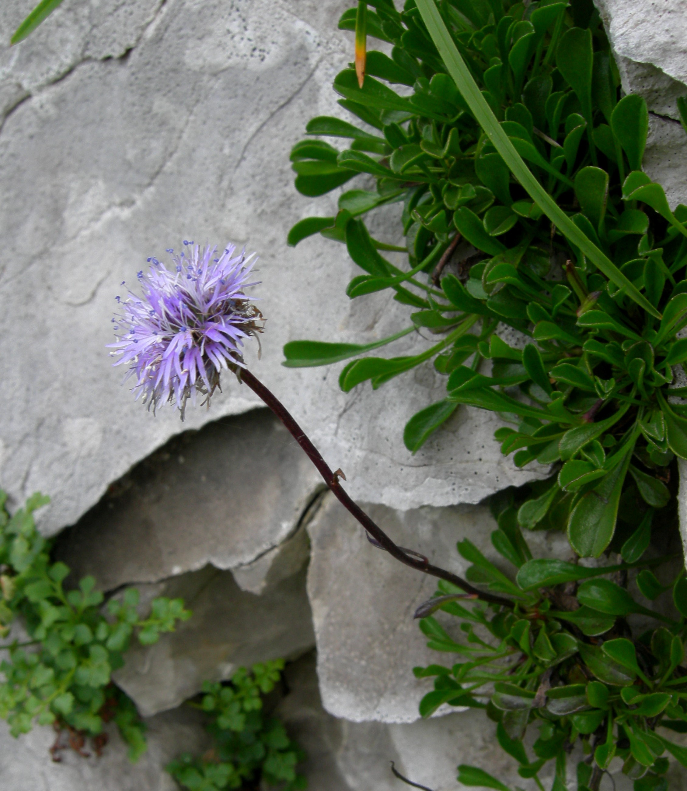 Globularia cordifolia (Srčastolistna mračica)